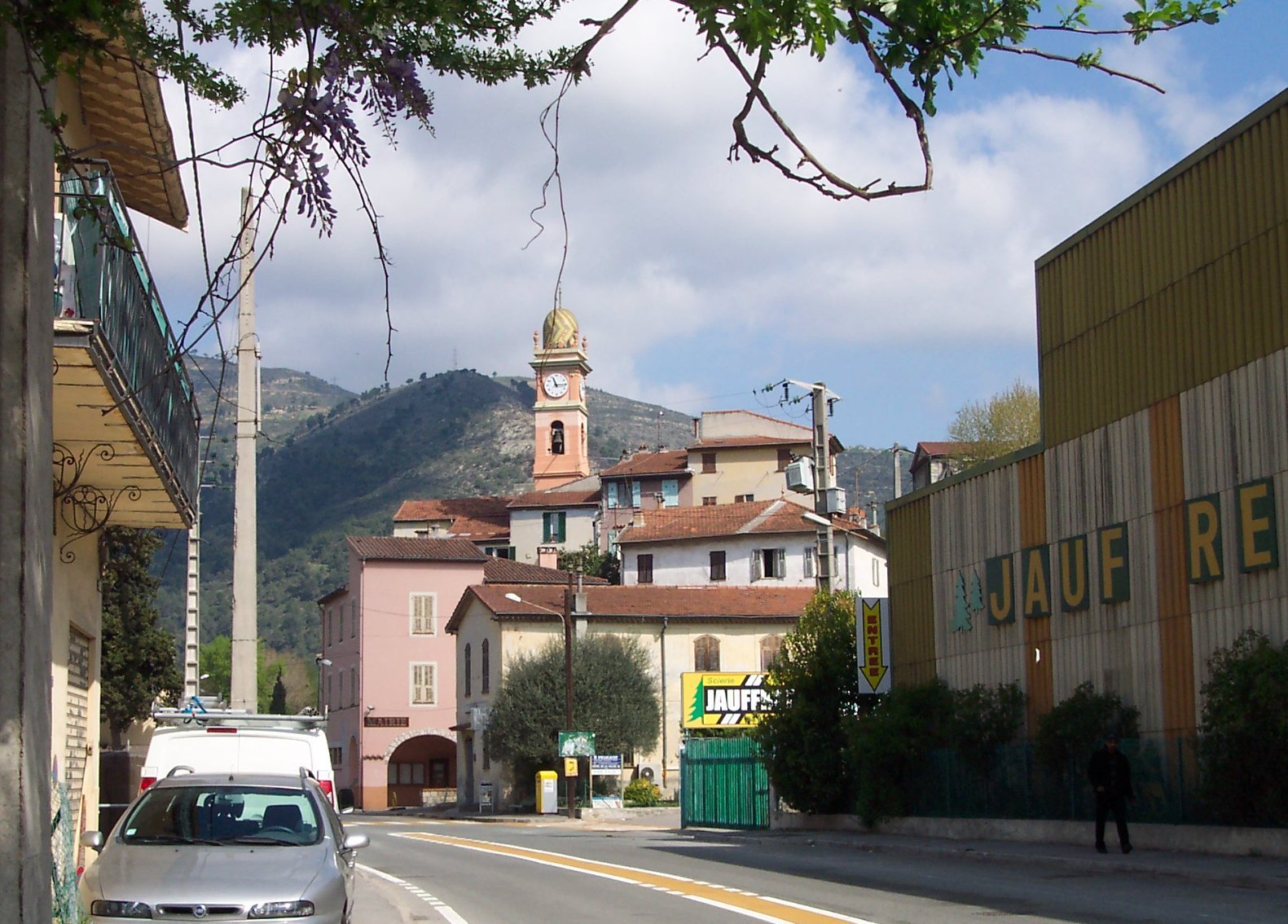 L'église et le vieux village vus de la route